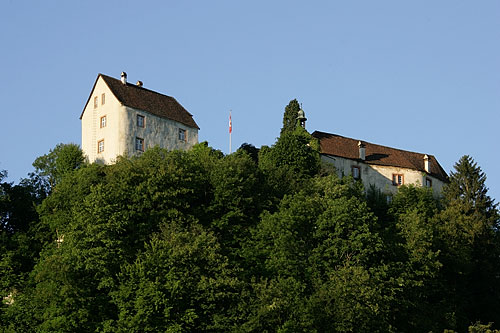 Burg in Burg im Leimental